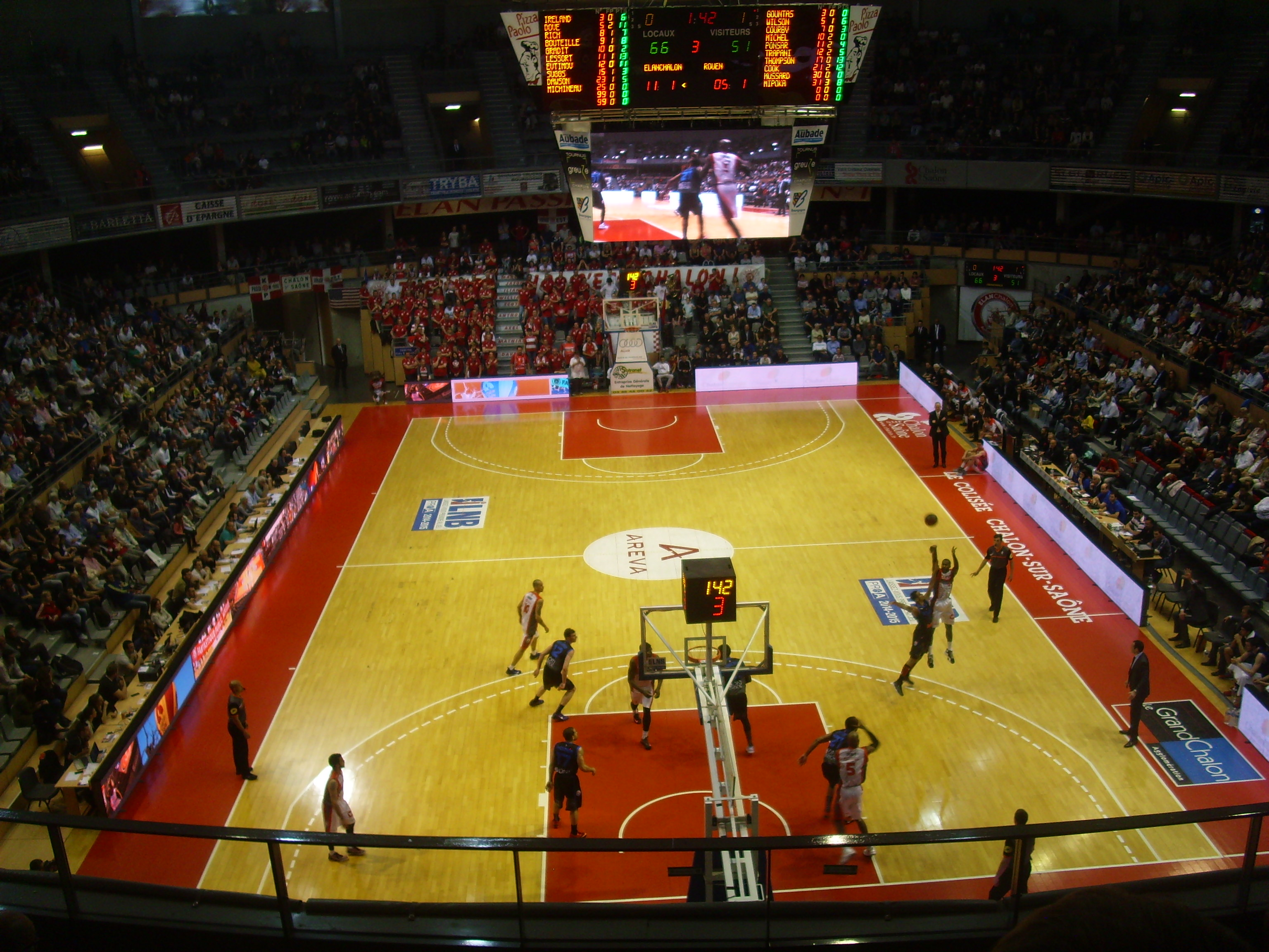 Match de Pro A (saison 2014-2015) entre l'Elan Chalon et le SPO Rouen au Colisé de Chalon-sur-Saône